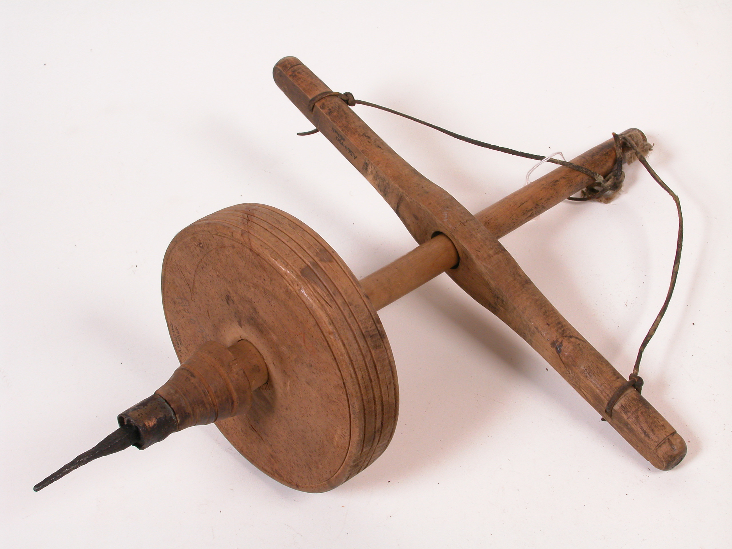 Vurrpuur